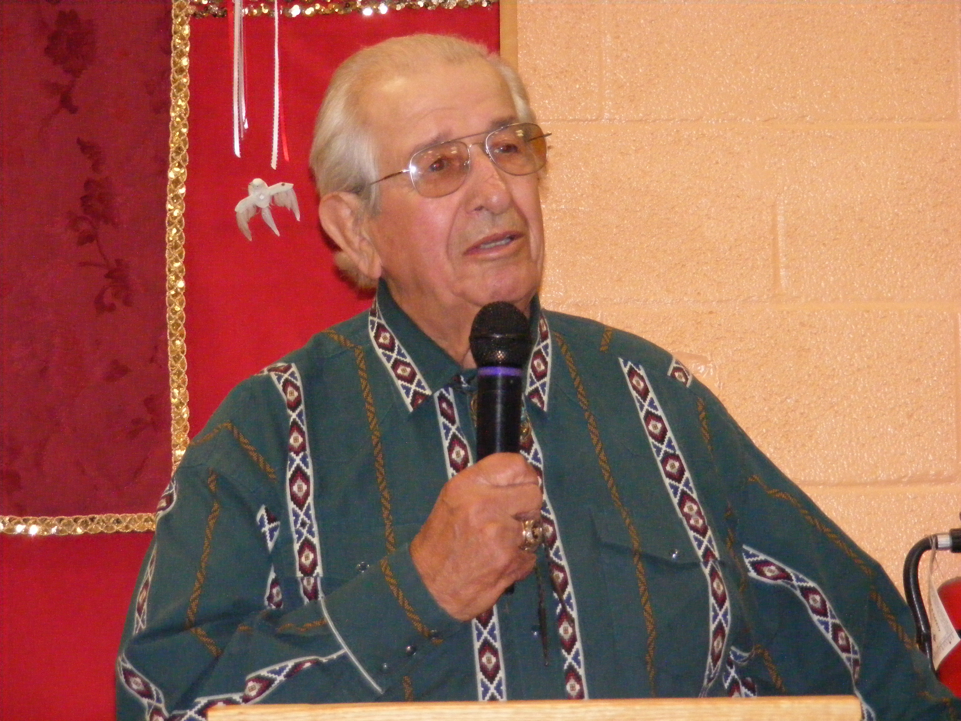 Le catcheur Chief Jay Strongbow en 2011 au cours de la cérémonie du New England Pro Wrestling Hall of Fame